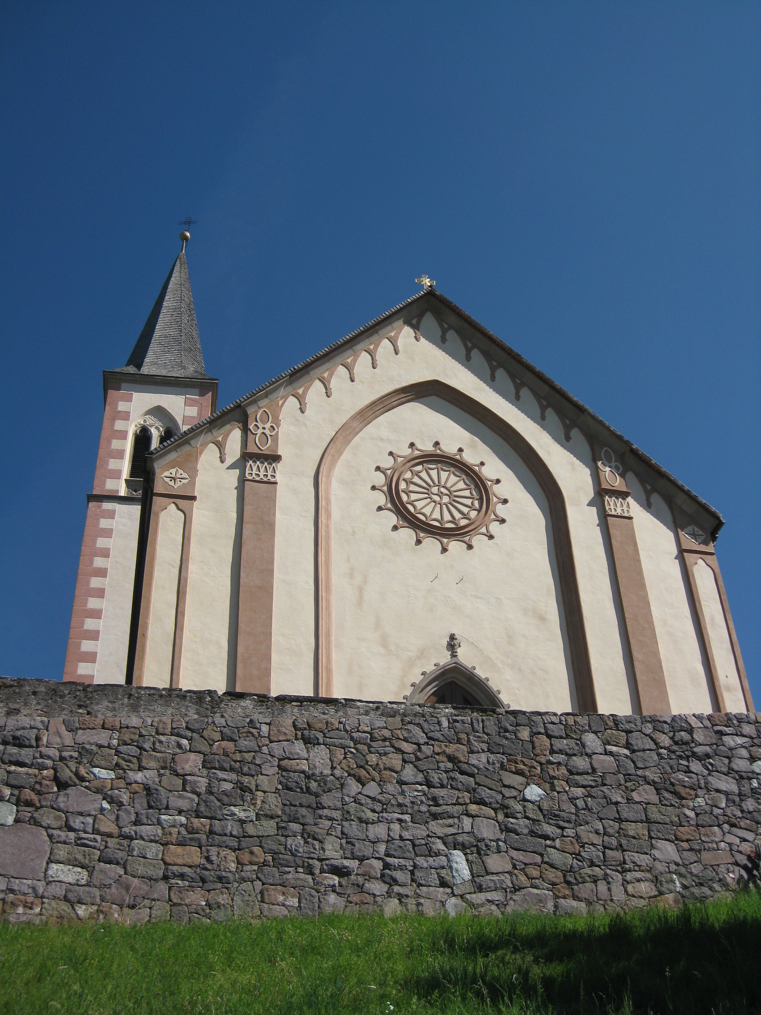 Pfarrkirche zum Heiligen Kreuz und St. Jakob und Helena in Aldein